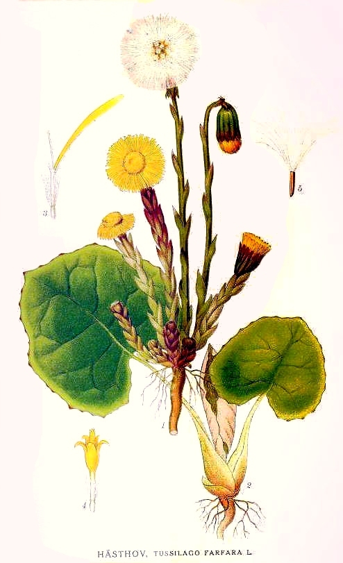 Original description Hästhov, Tussilago farfara L.